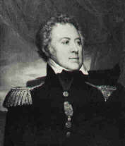 Portrait du Général Victor de Fay de Latour-Maubourg (1768-1850)